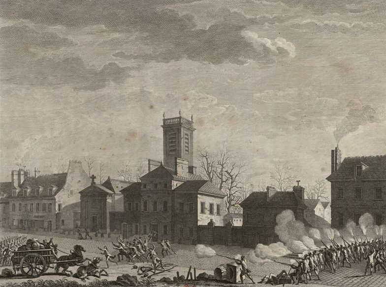 Estampe recadrée